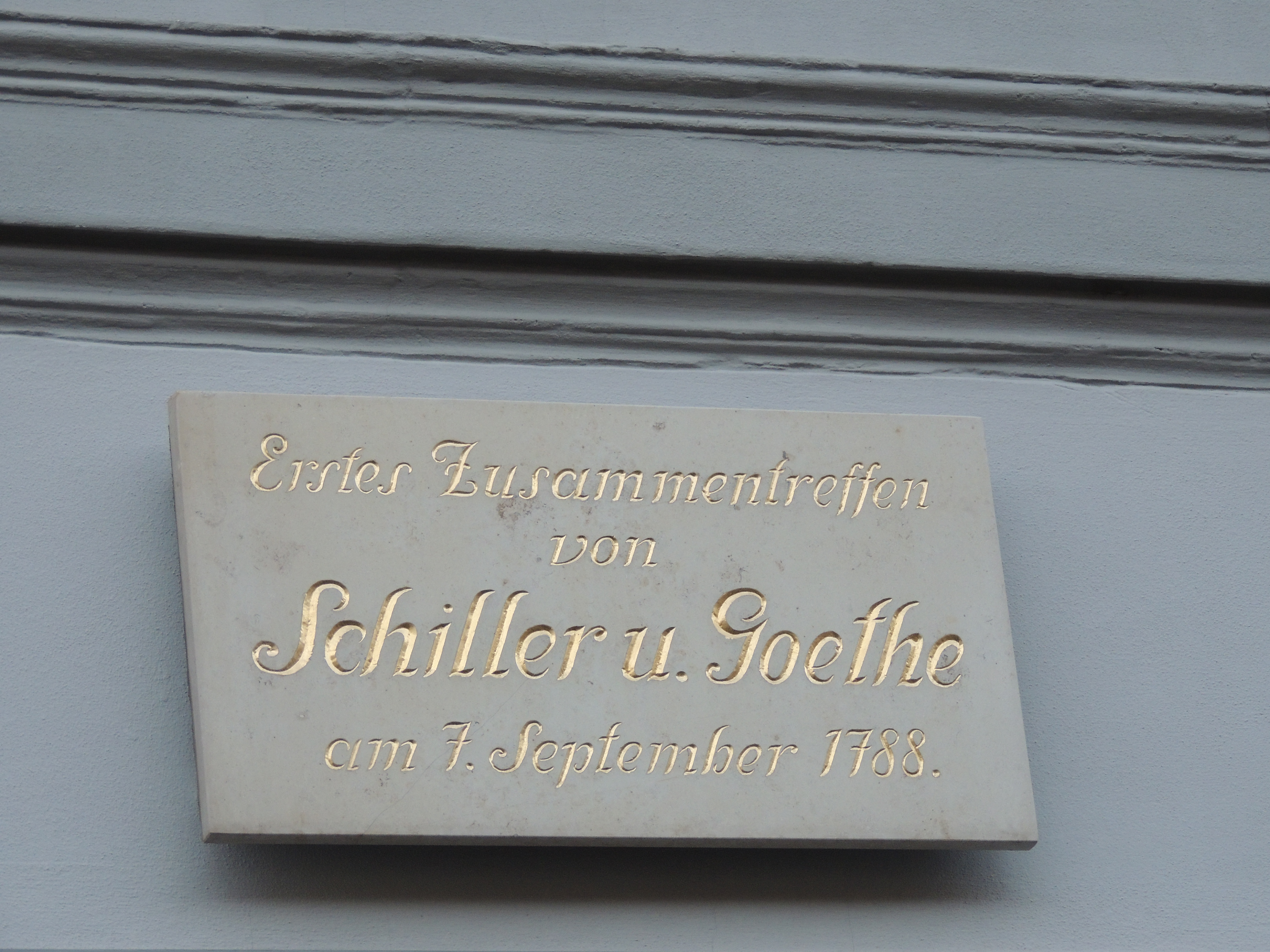 Gedenktafel an den Ort des ersten Zusammentreffens von Goethe und Schiller am denkmalgeschütztes Wohnhaus in der Schillerstraße 25 in Rudolstadt; Museum Schillerhaus